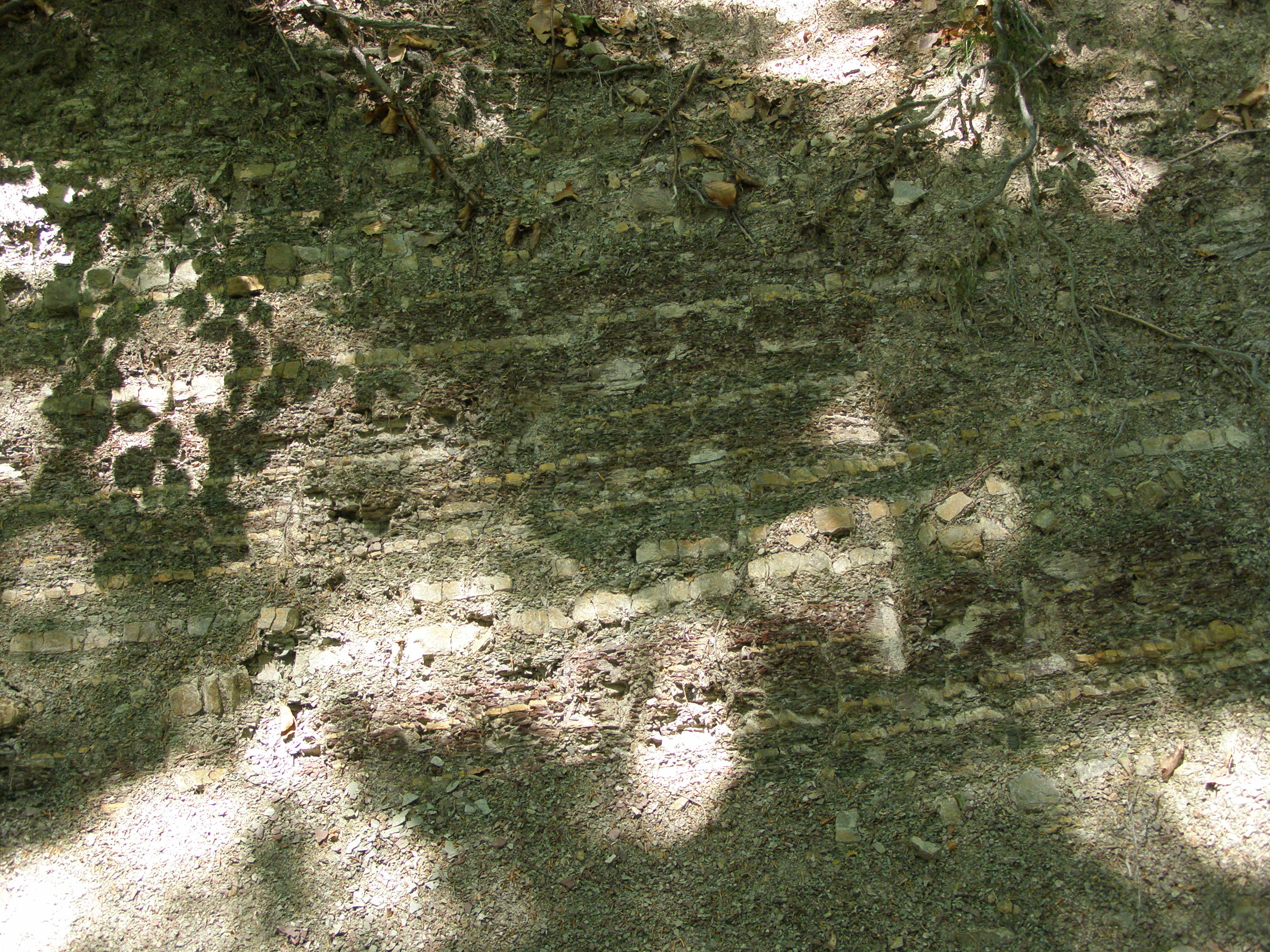 Ondřejník, flyš tvořící masiv Ondřejníku